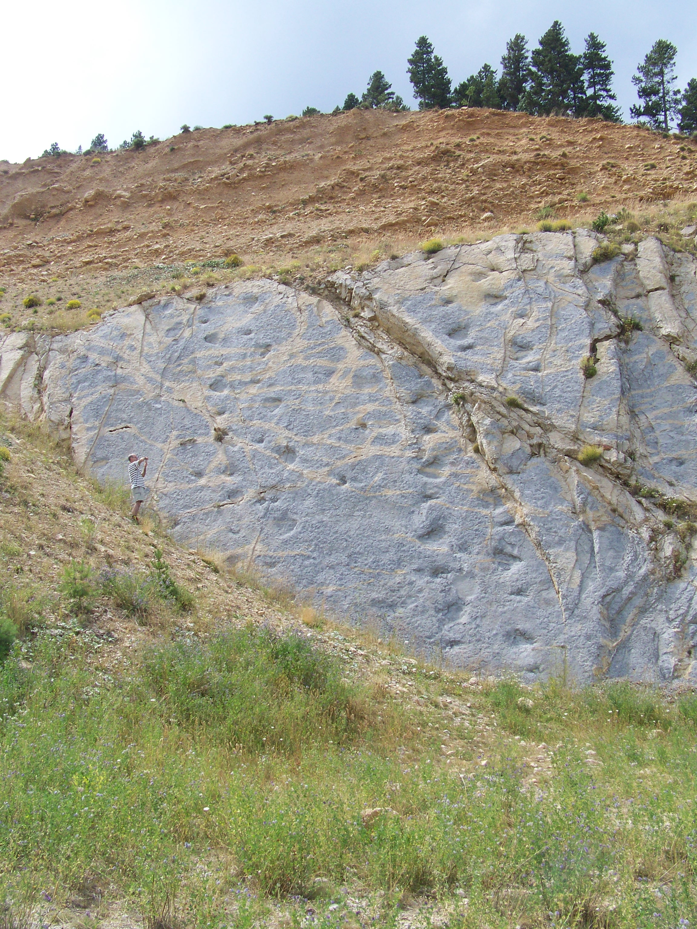 Dos rastres de titanosaure paral·lels a Pedra Ronyosa.